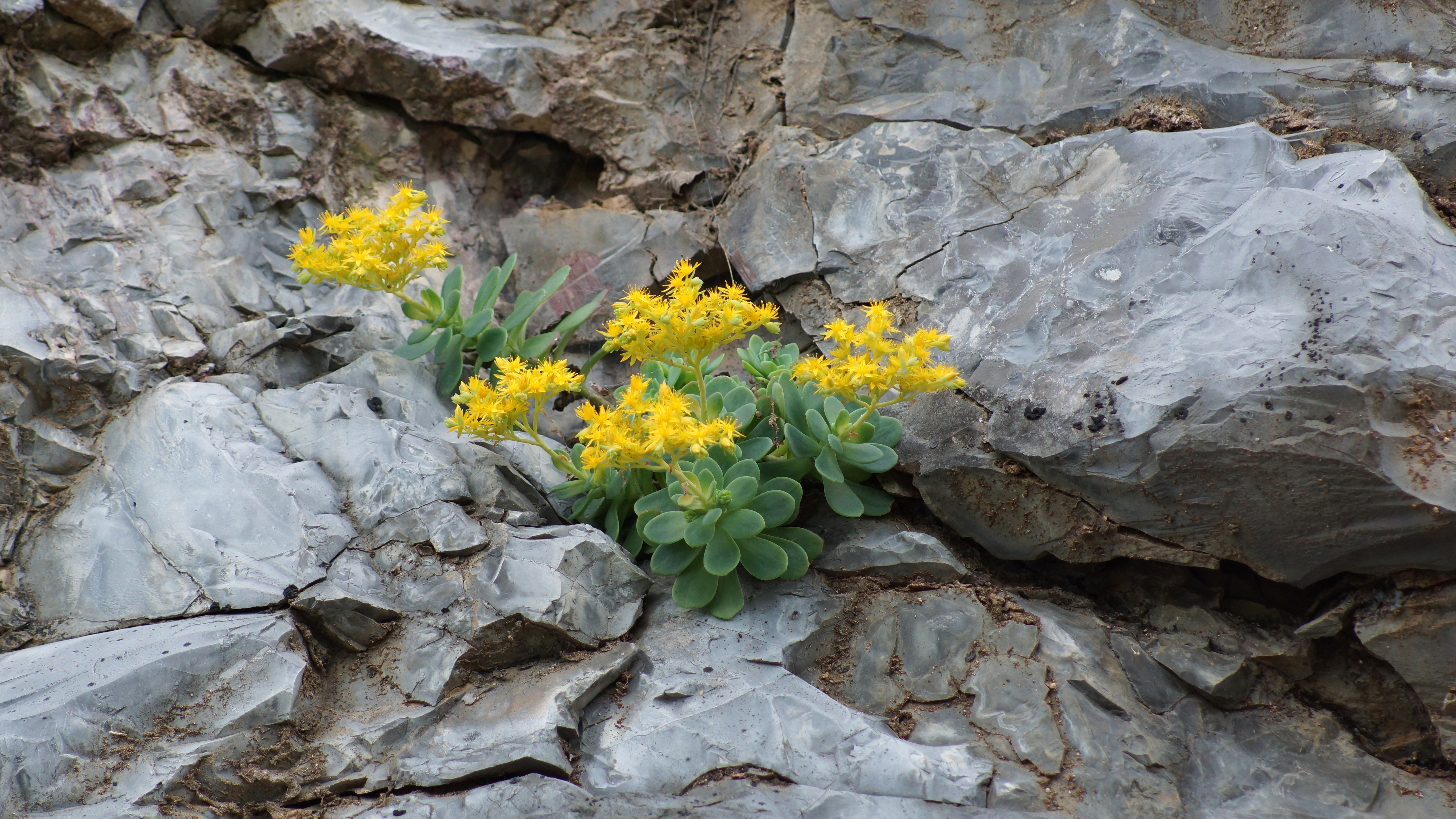 Familia: Crassulaceae Genero: Sedum Especie: S. palmeri Nombre común: Sedum